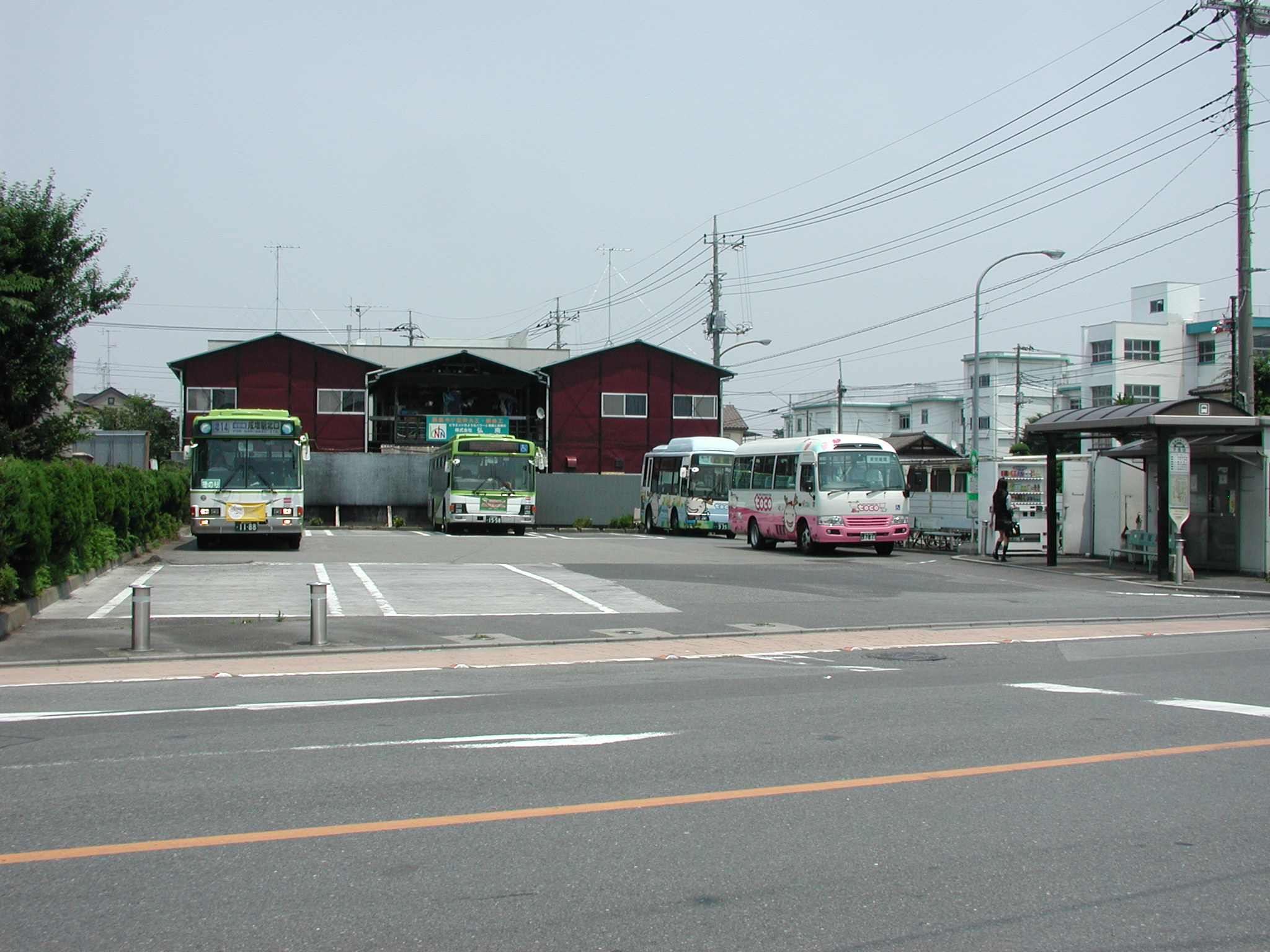 国際興業 下笹目折返場（埼玉県戸田市）